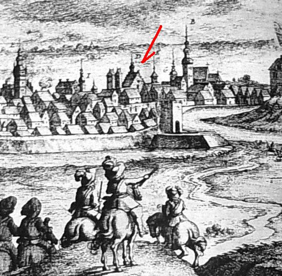 Kościół Karmelitów na panoramie Bydgoszczy Erika Dahlberga z 1657 r.